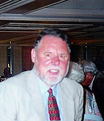 Terry Waite (1998).